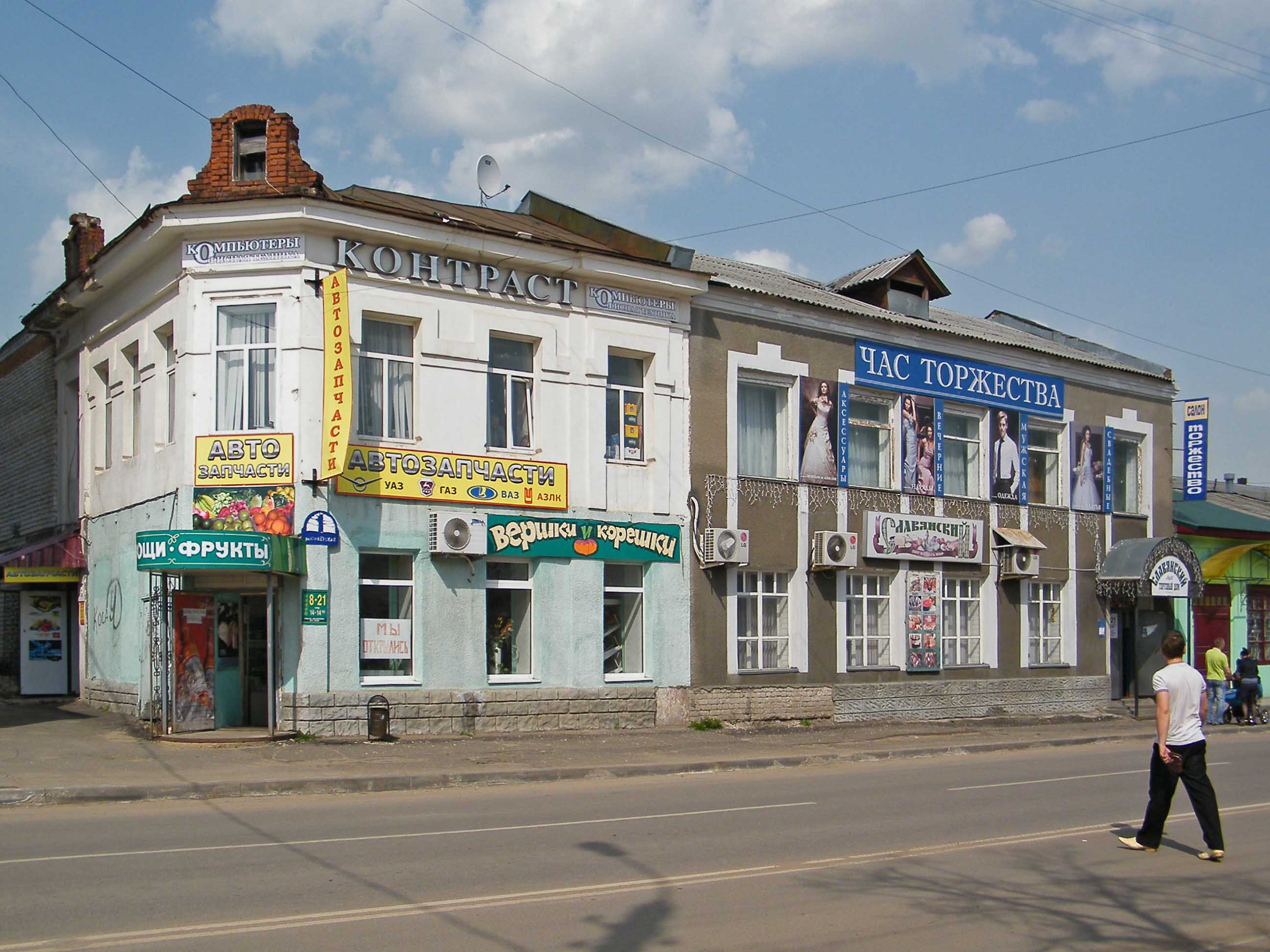 Старый город